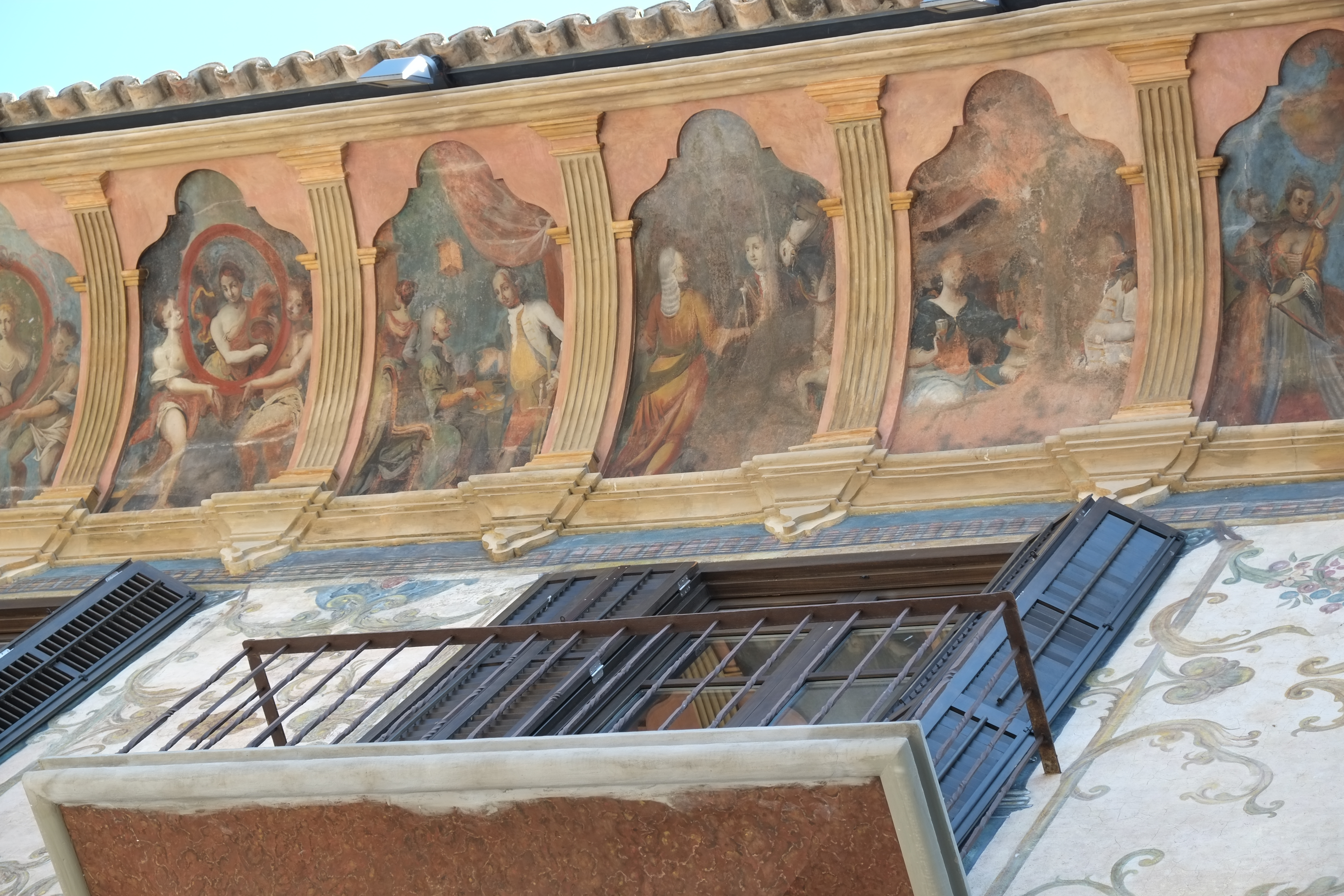 Casa Heredia in Graus in der Provinz Huesca in Aragonien (Spanien)